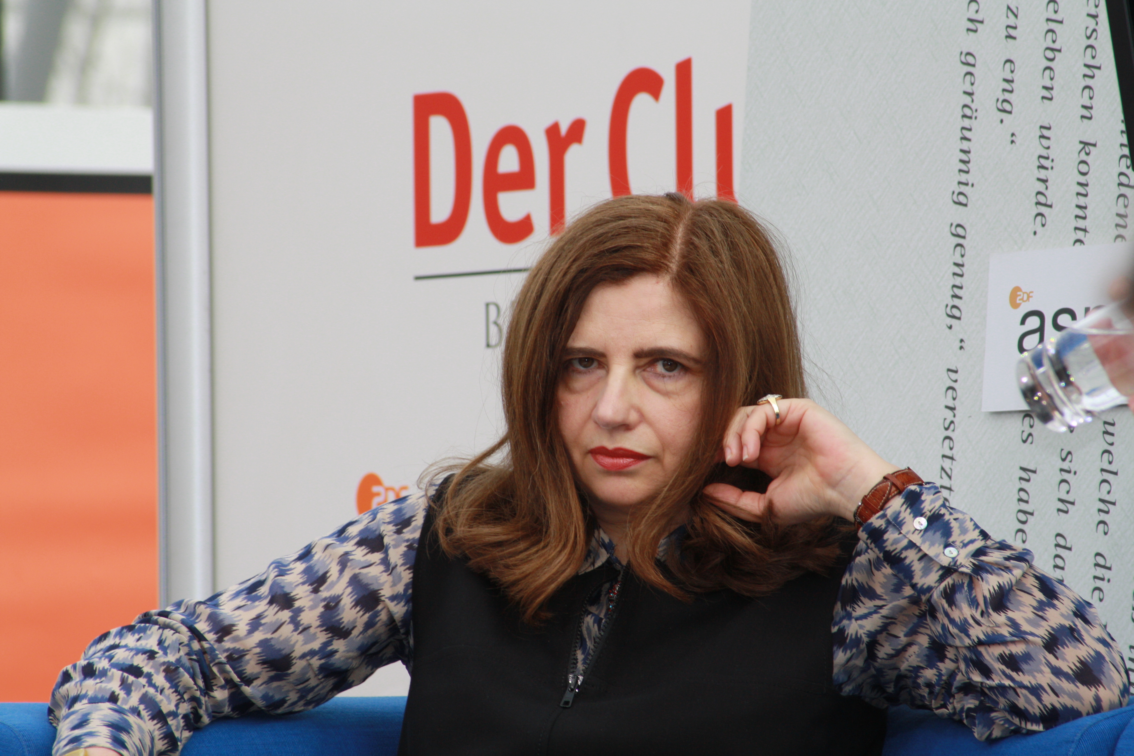 Sibylle Lewitscharoff auf der Leipziger Buchmesse 2009